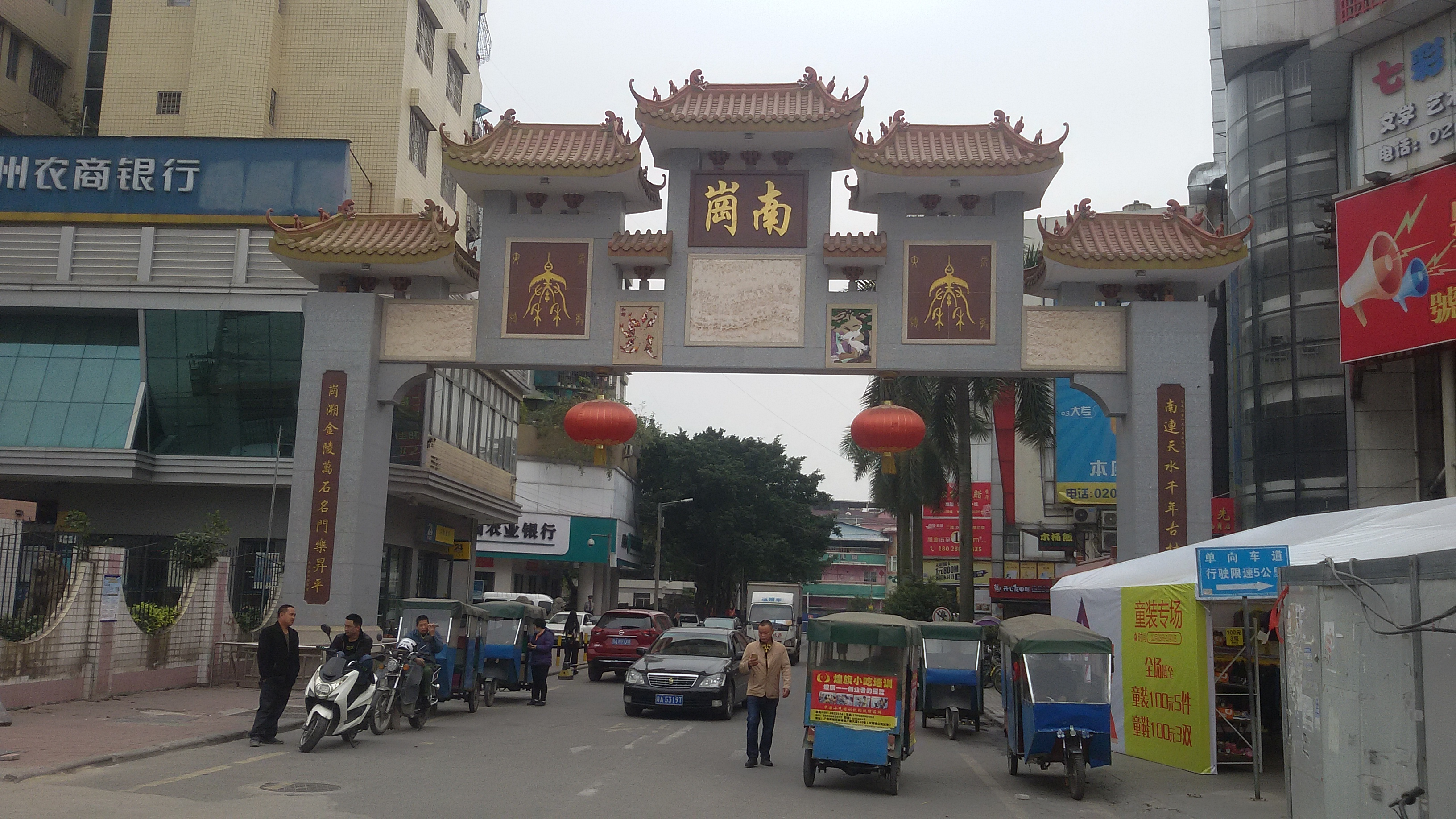 粵語: 廣東廣州黃埔區南崗村牌坊